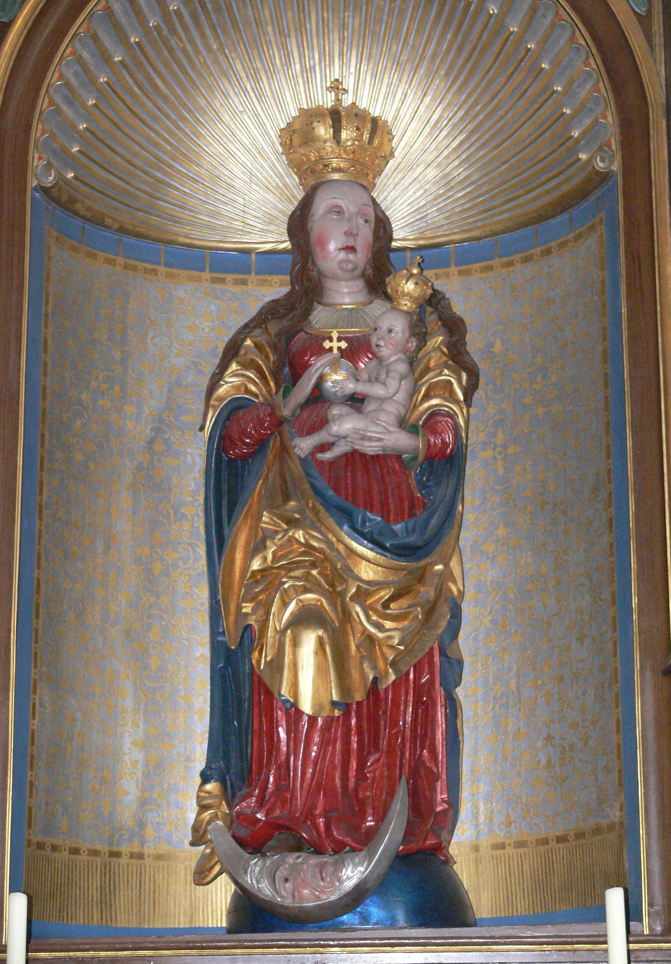 Frauenbergkirche, Bad Waldsee Hochaltar, Kopie einer mittelalterlichen Madonna aus dem Vorgängeraltar (Kopie evtl. von Hans Zürn d. Ä.)